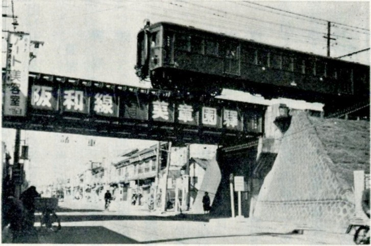 1956年頃の阪和線美章園駅付近。